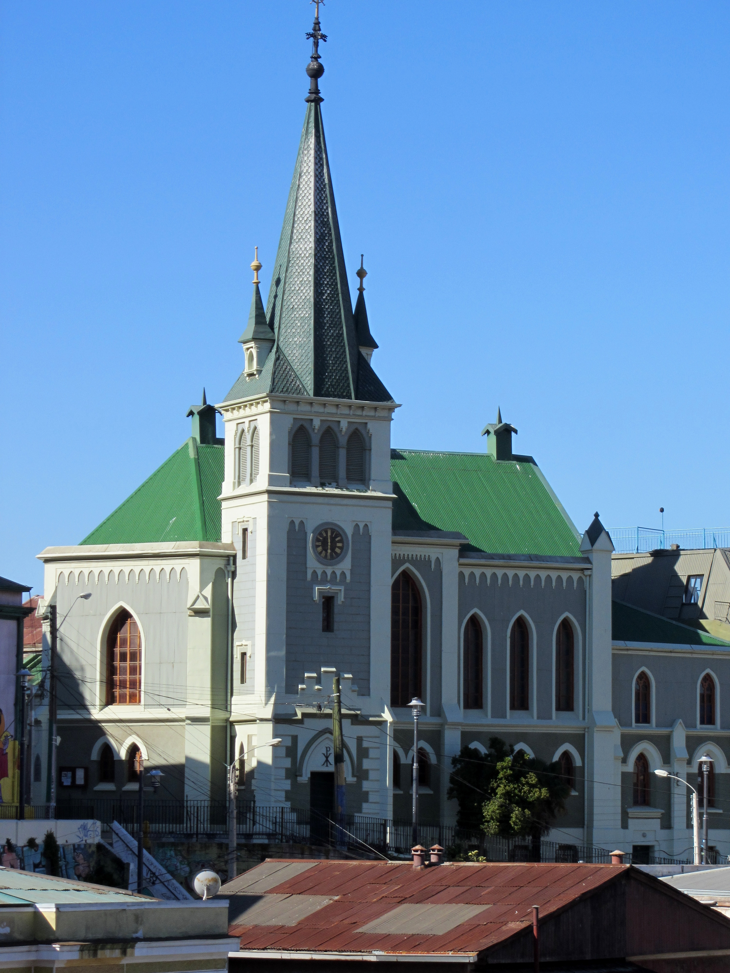 La Iglesia luterana de Valparaíso fotografiada desde la salida de la estación alta del ascensor Reina Victoria, paseo Dimalow, sobre la plazoleta Lukas.